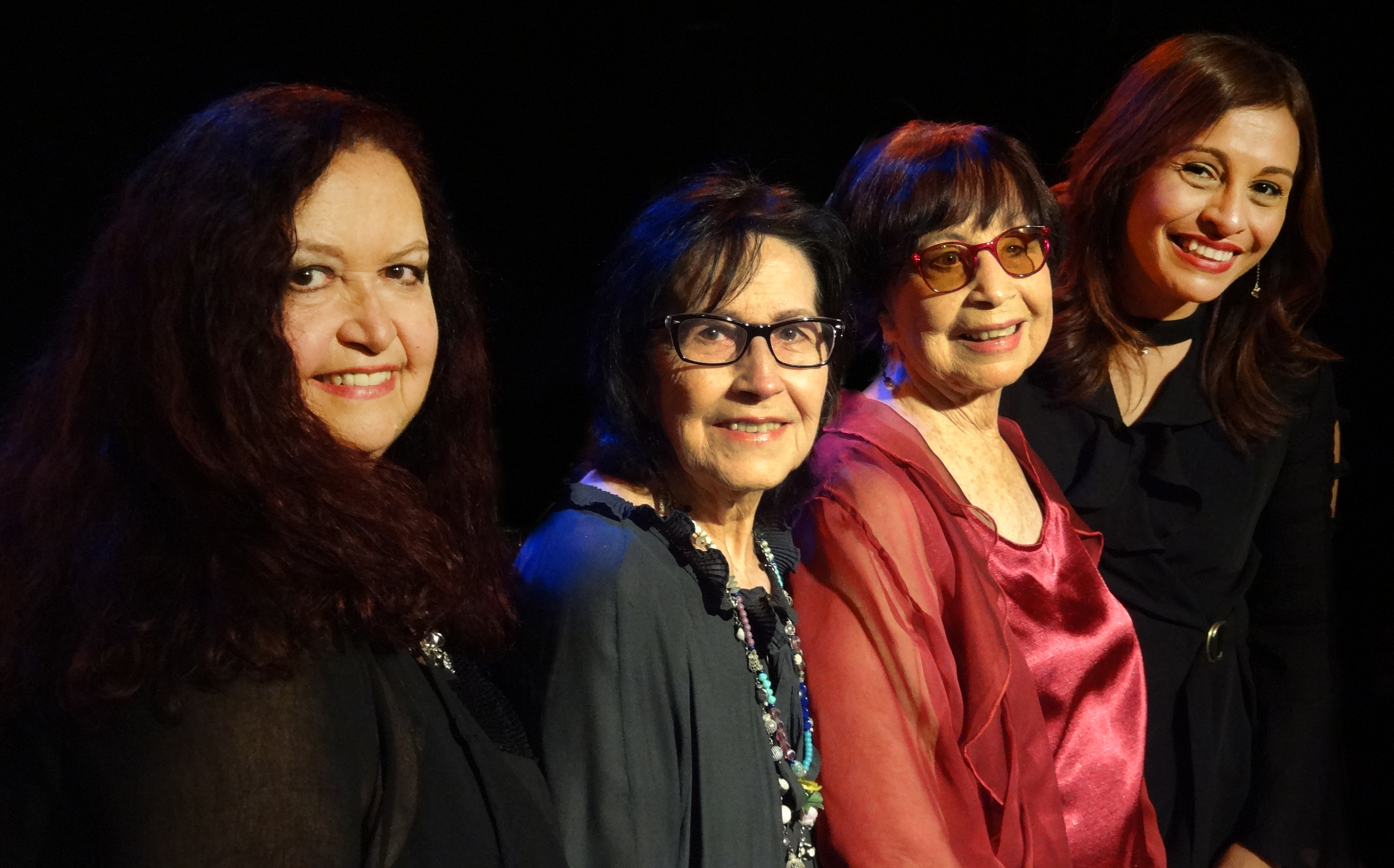 Quarteto em Cy 2018 - Sonya, Cynara, Cyva e Corina